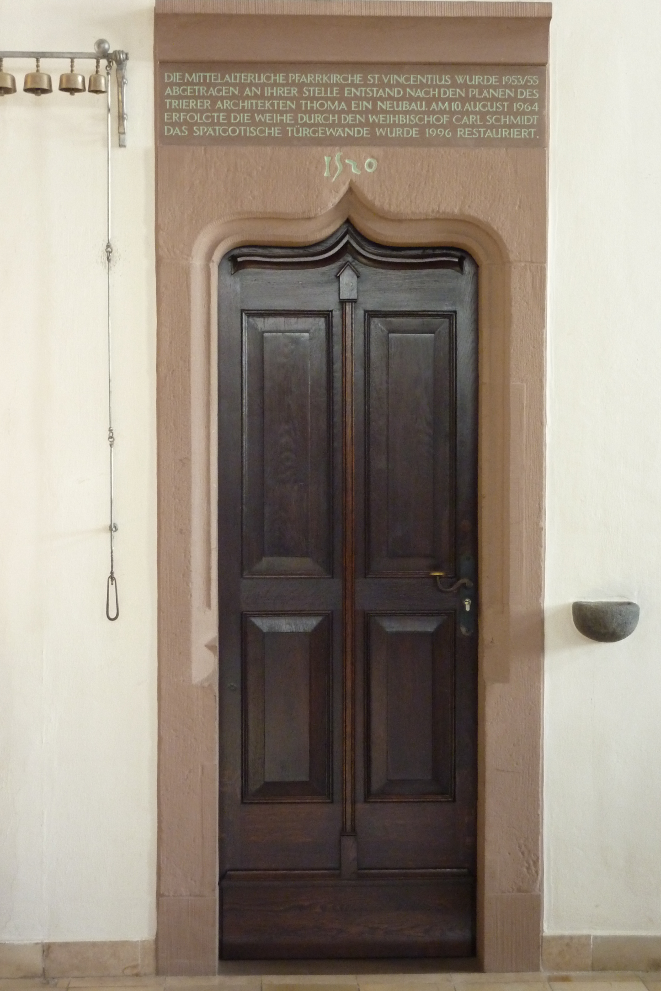 Pfarrkirche St. Vincentius in Wershofen, spätgotische Tür der alten Kirche, heute Eingang zur Sakristei